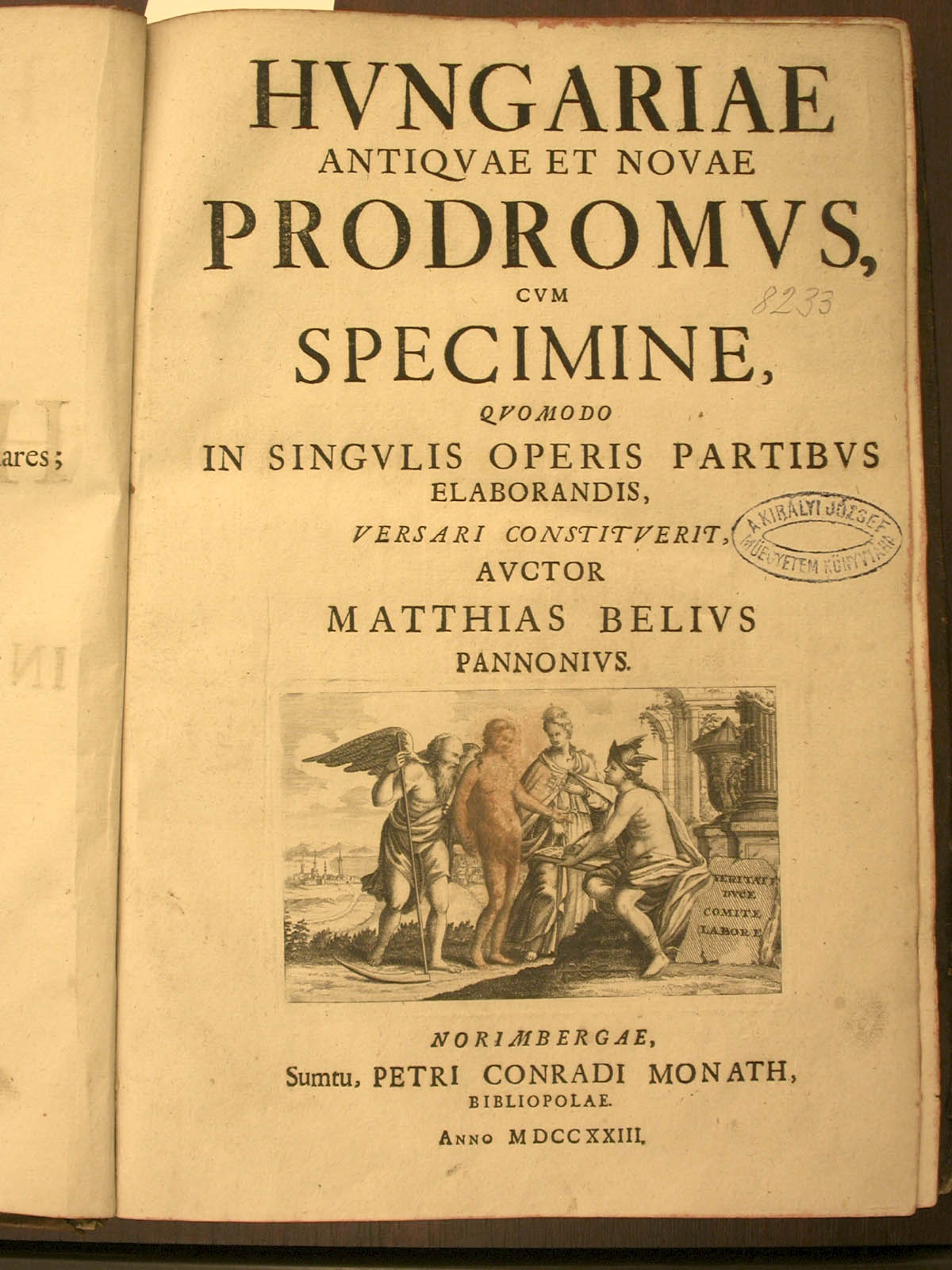 Bél Mátyás: Hungariae Antiquae et Novae Prodromus (Nürnberg, 1723)